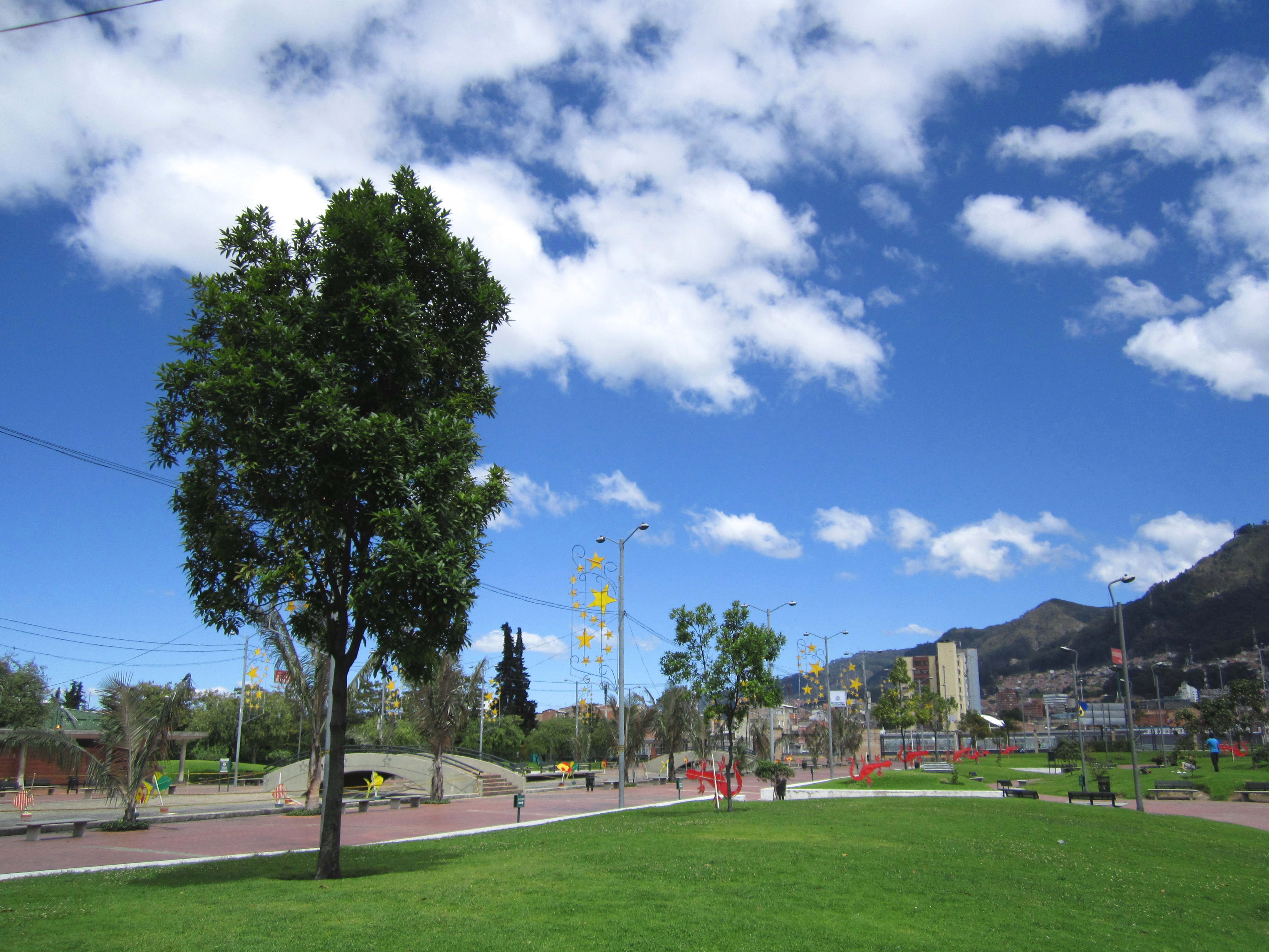 Bogotá, parque El Renacimiento, carrera 20 con calle 24. Localidad de Los Mártires.